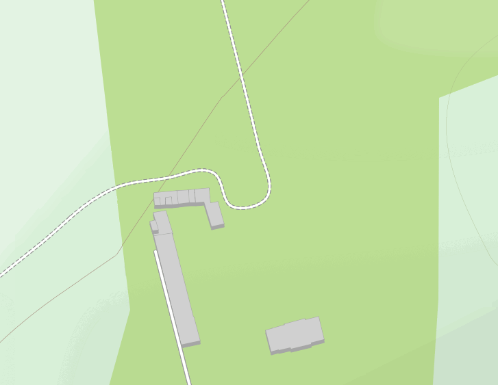 Lageplan des Schlosses Montjalin bei Sauvigny-le-Bois, Burgund This map may be incomplete, and may contain errors. Don't rely solely on it for navigation.